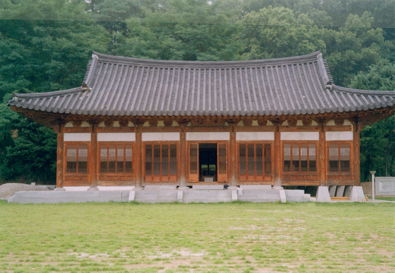 경기도 기념물 제167호 양주관아지 (楊洲官衙址)